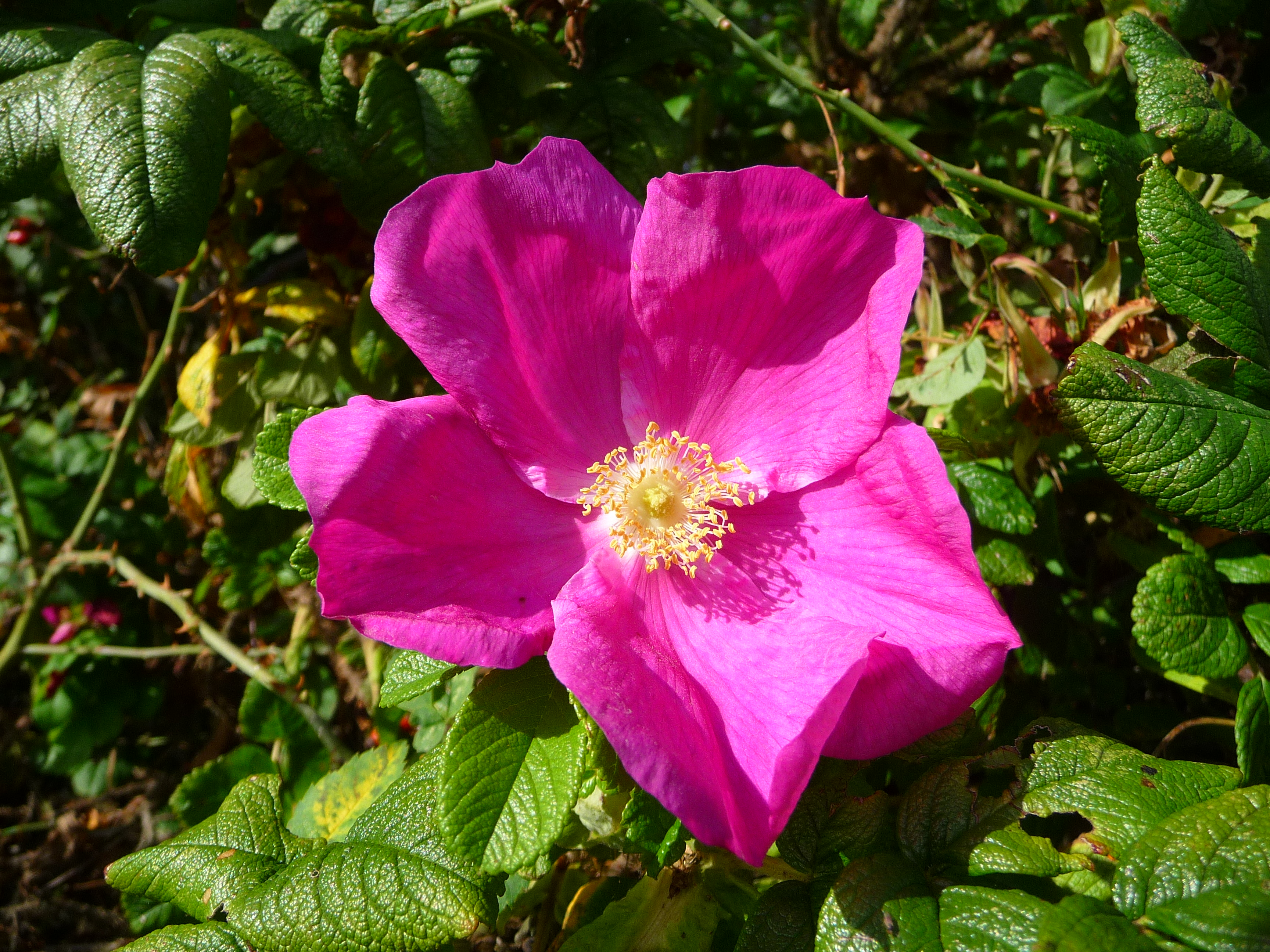 Blüte der Kartoffelrose (Rosa rugosa), fotografiert auf der ostfriesischen Nordseeinsel Juist (Niedersachsen, Deutschland)